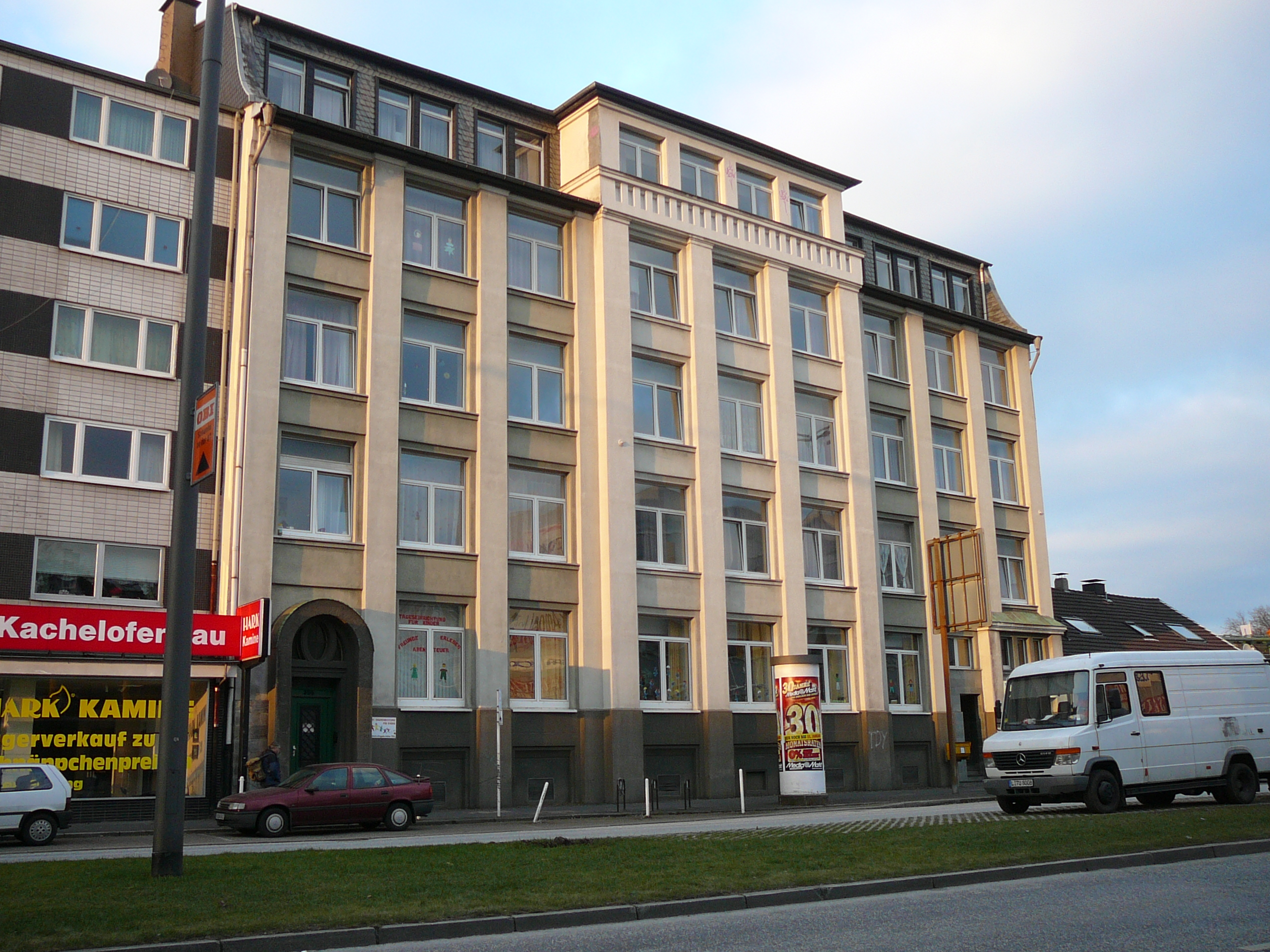 Friedrich-Engels-Allee, Wuppertal